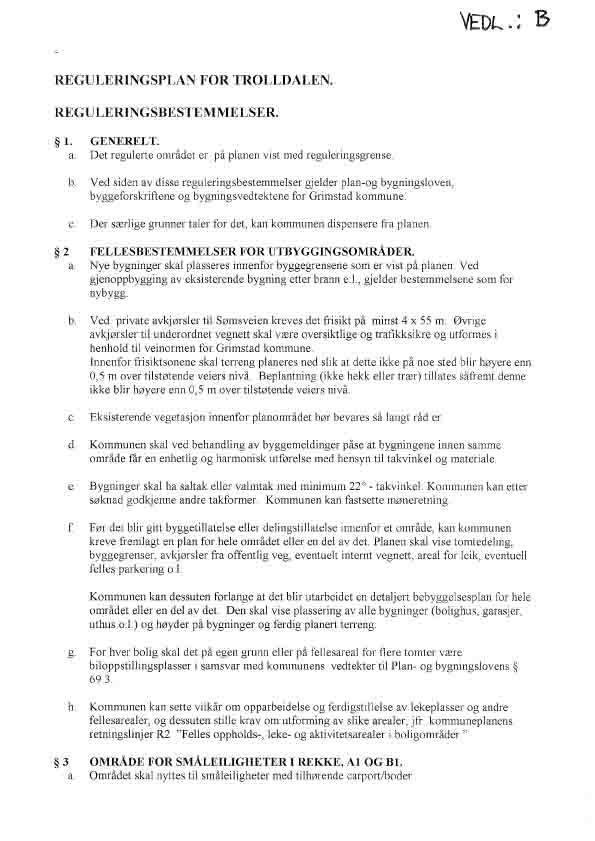 Reguleringsbestemmelser til Reguleringsplan, Trolldalen, Grimstad. Side 1 av 4.